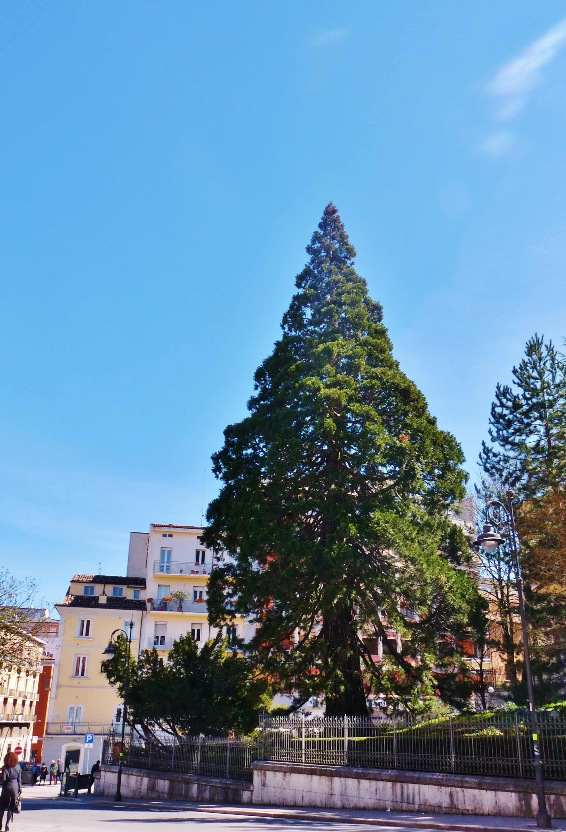 Sequoia gigante ubica nel giardino del Convitto Mario Pagano, in Via Mazzini a Campobasso This is a photo of a monument which is part of cultural heritage of Italy.